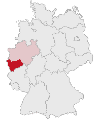 Regierungsbezirk Köln, North Rhine-Westphalia, Germany